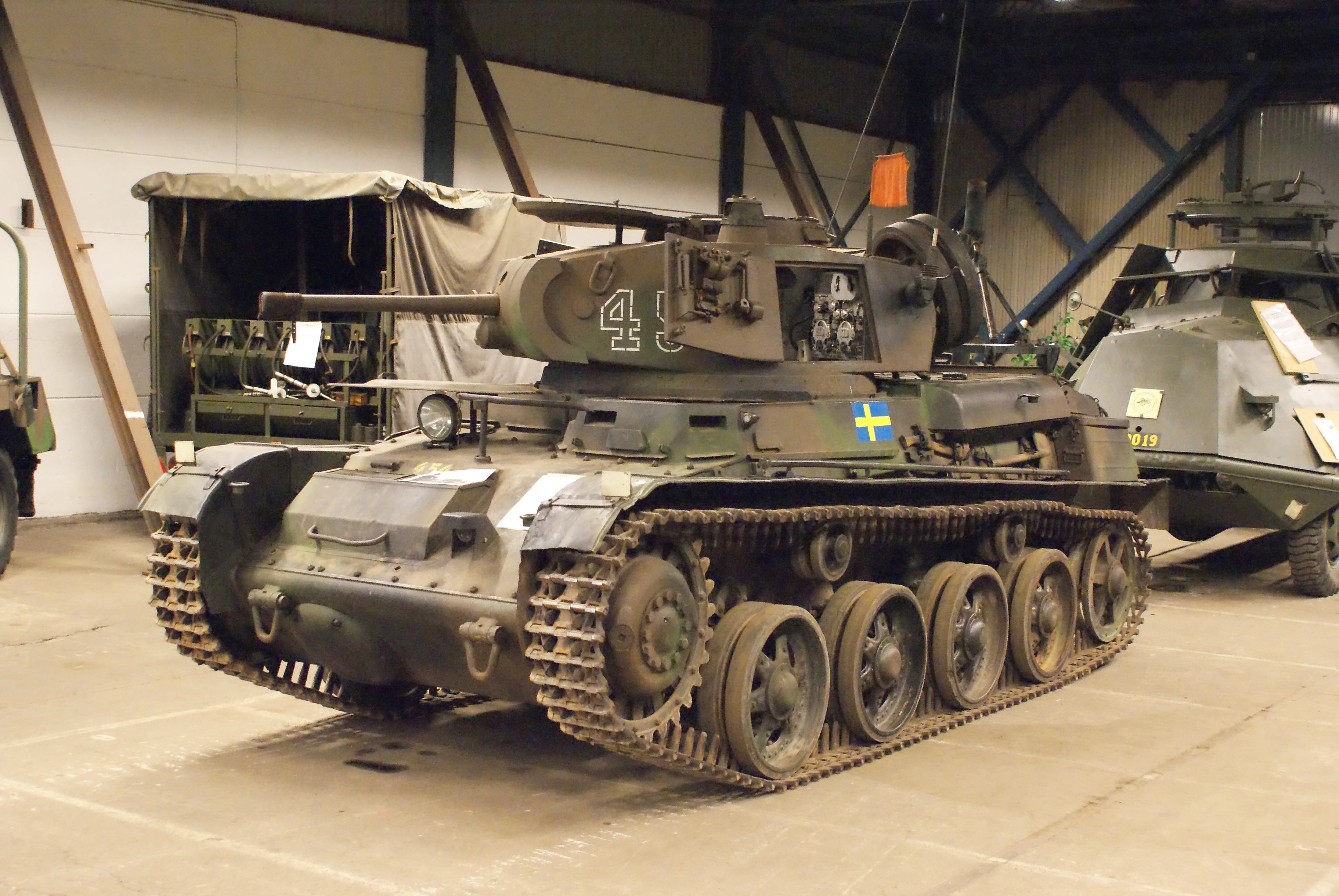 Stridsvagn m/40K i Hässleholms Museum 31.07.09